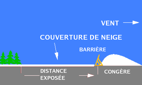 Snowdritf barrier effect /Barrière à neige et son effet